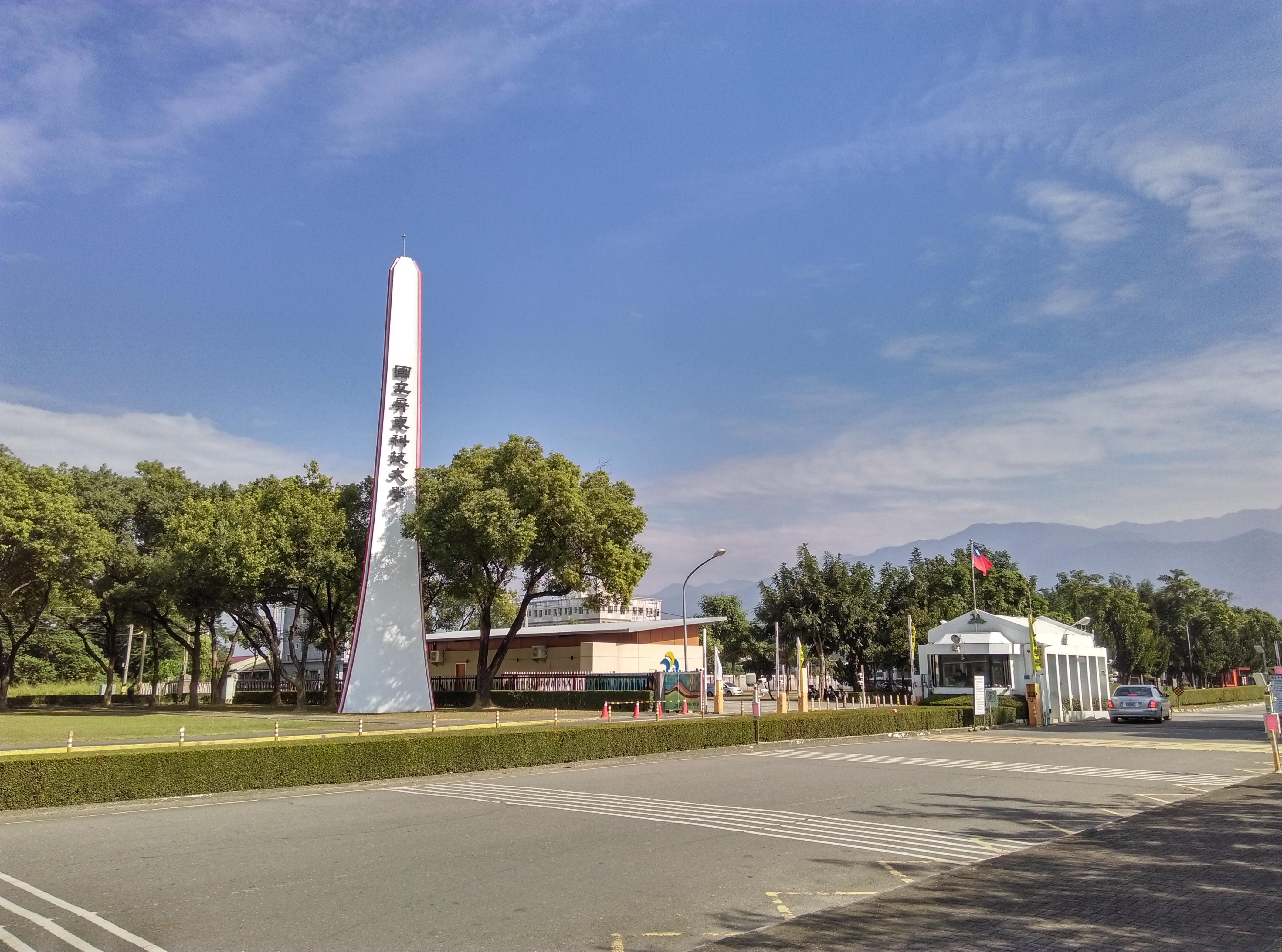 中文（台灣）: 國立屏東科技大學校門。